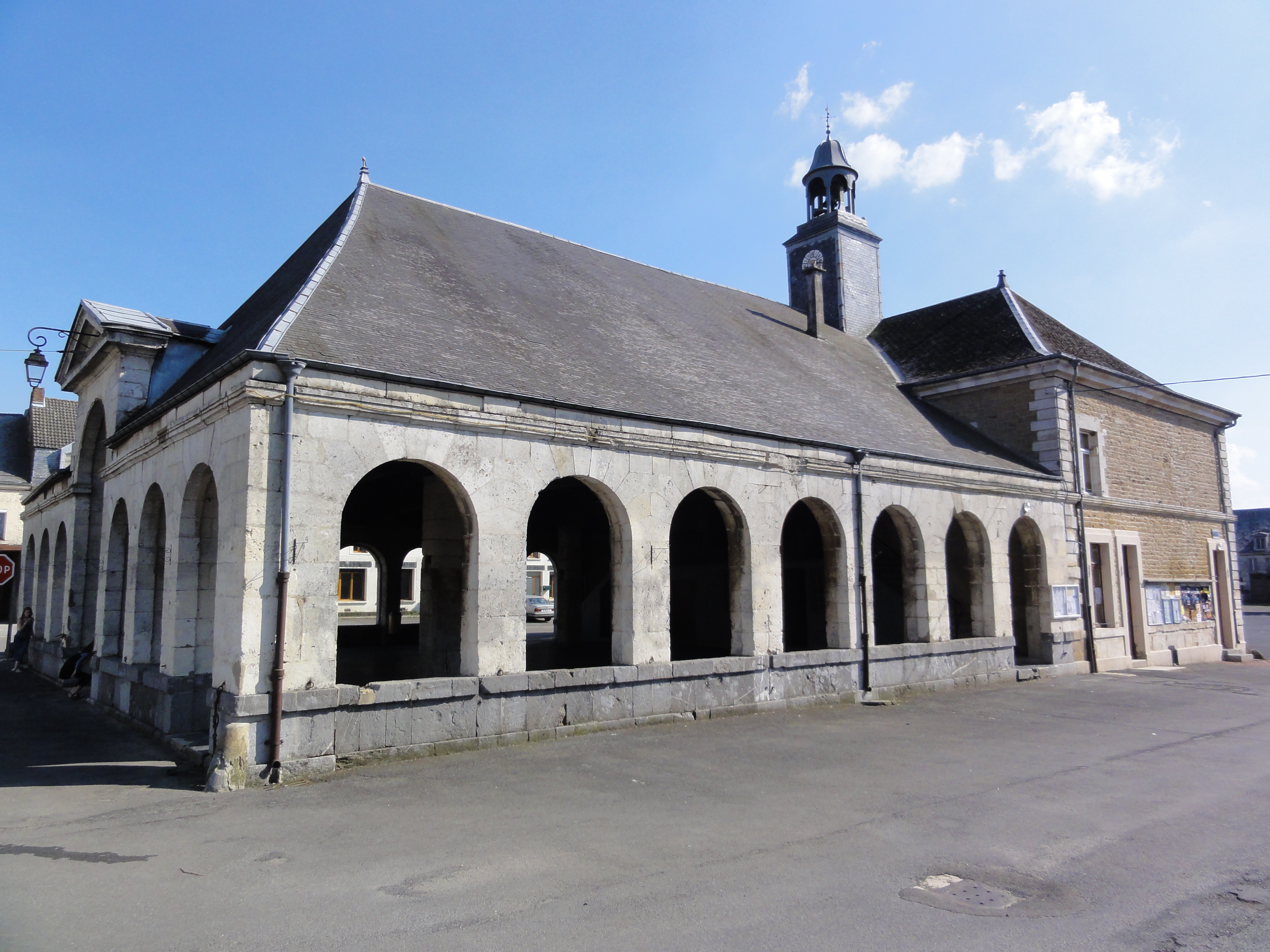 Auvillers-les-Forges (Ardennes) Les Halles